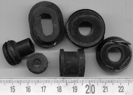 some rubber grommets